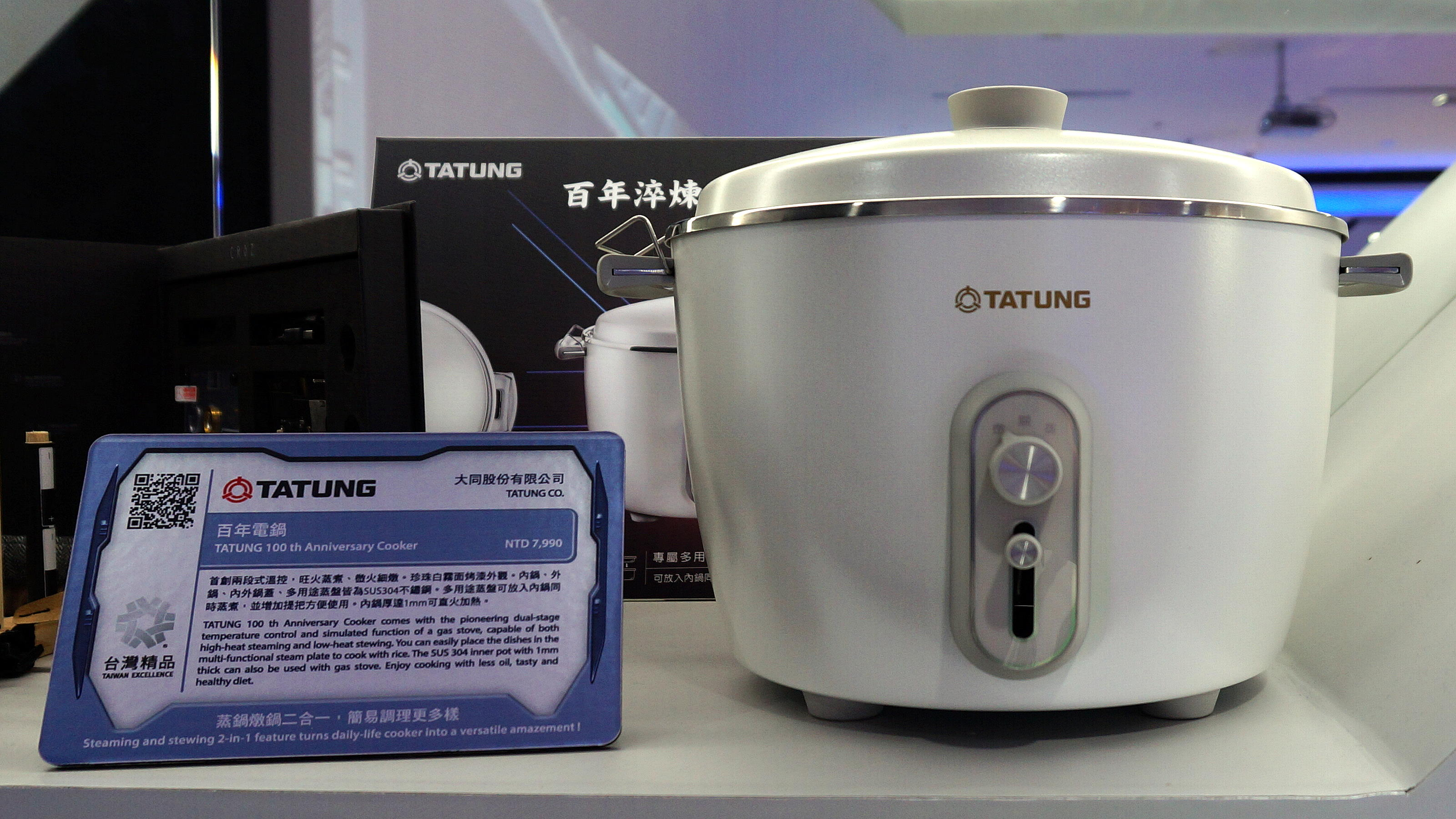 台北南港展覽館1館3樓台灣精品館，大同百年電鍋。